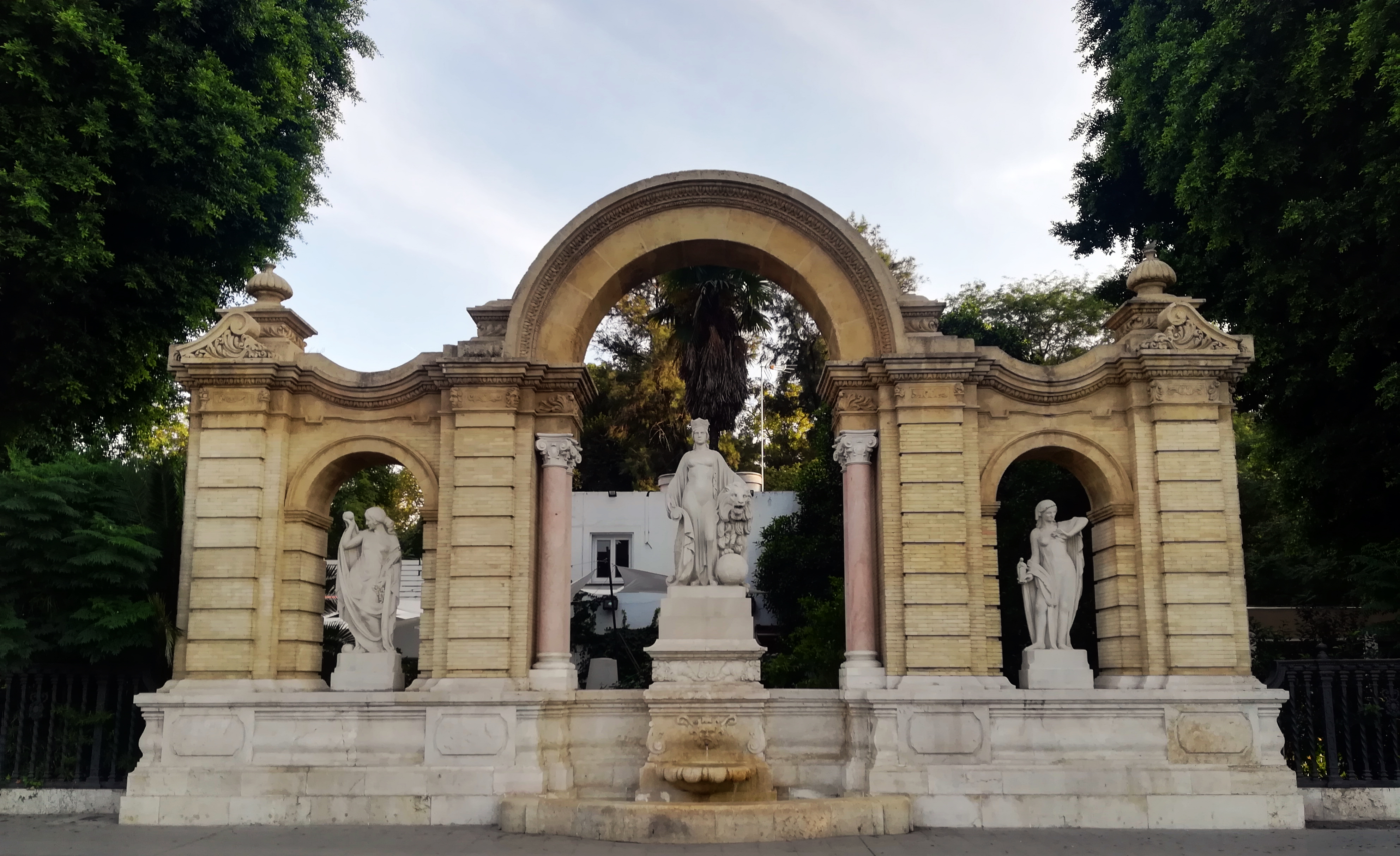 Glorieta de San Diego. Sevilla, Andalucía, España.